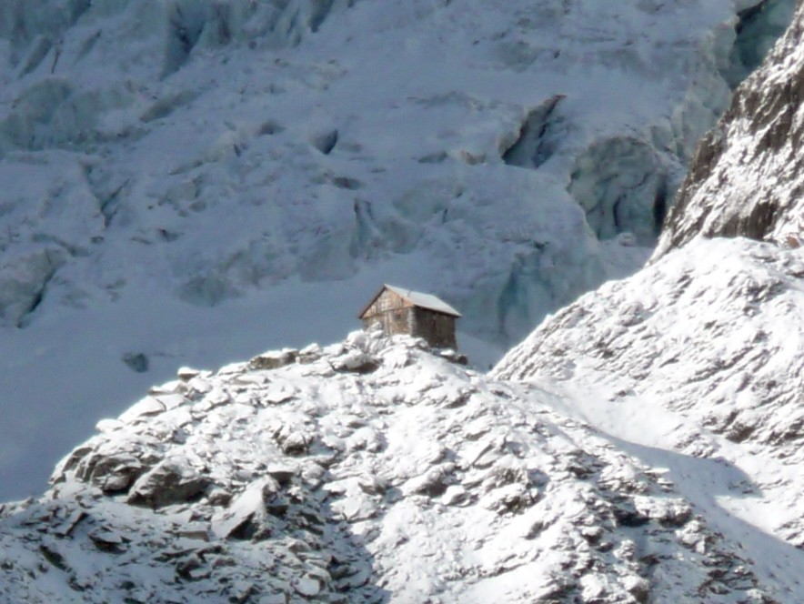 Grünhornhütte in den Glarner Alpen erbaut 1863, die älteste Berghütte des Schweizerischen Alpenclubs. Fotografiert von den Fridolinshütte aus.